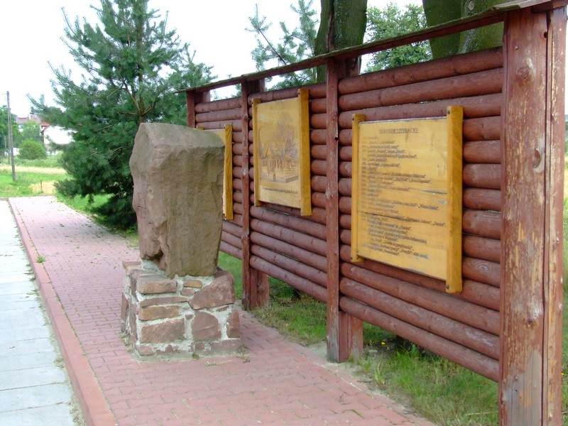 Strawczyn. Kamień pamiątkowy w miejscu domu rodzinnego Stefana Żeromskiego. W tle tablice prezentujące chronologicznie wydarzenia z życia pisarza, dorobek literacki, oraz prezentujące w formie drzeworytu wizerunek dawnego domu.